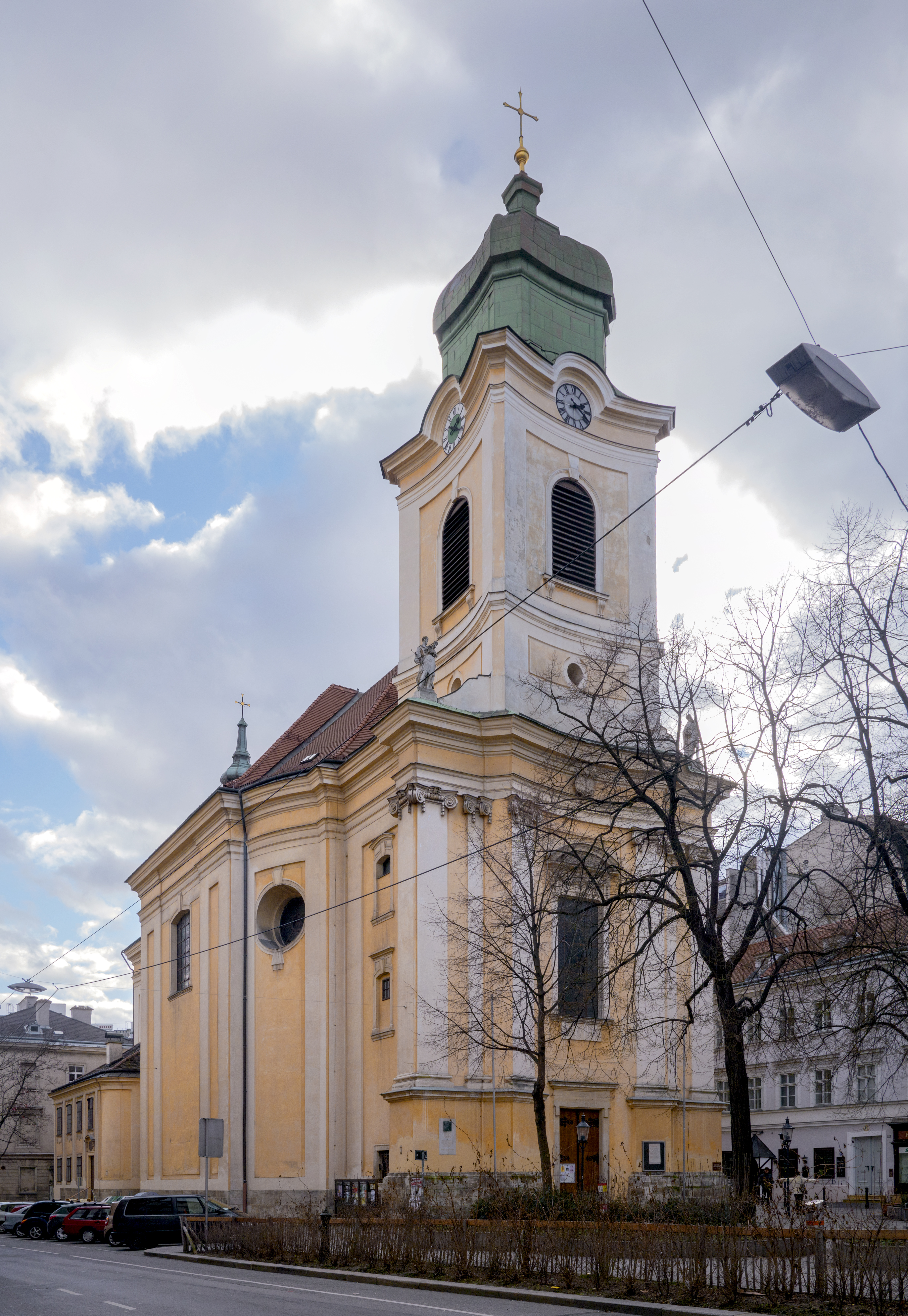 Kath. Pfarrkirche, Ägidikirche